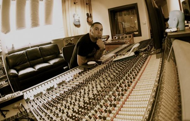 suomalainen muusikko, miksaaja, säveltäjä ja tuottaja Toni Kimpimäki (s. 1977).